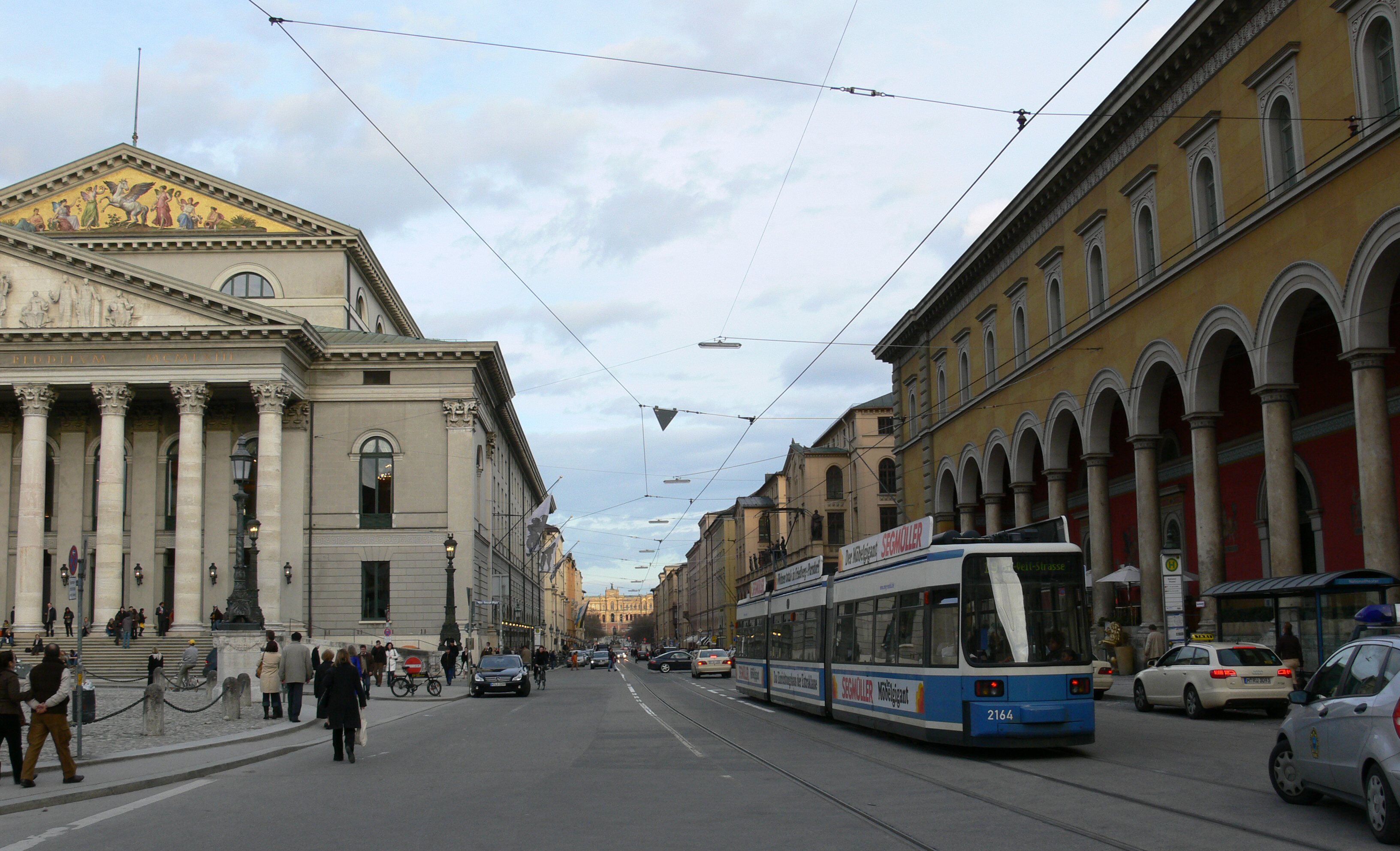 Maximilianstraße, München, 2006; links: Nationaltheater, Hintergrund Mitte: Maximilianeum; rechts: Hauptpost (ehem. Palais Törring-Jettenbach, Residenzstraße 2; Fassade zum Max-Joseph-Platz/Maximilianstraße von Leo von Klenze 1836-1839)